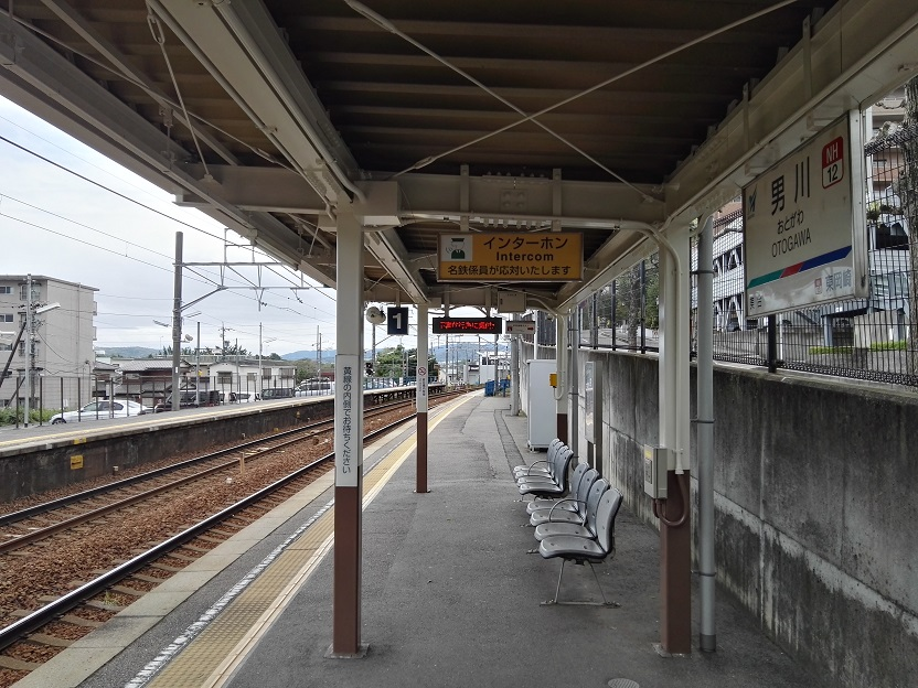 Otogawa station platform